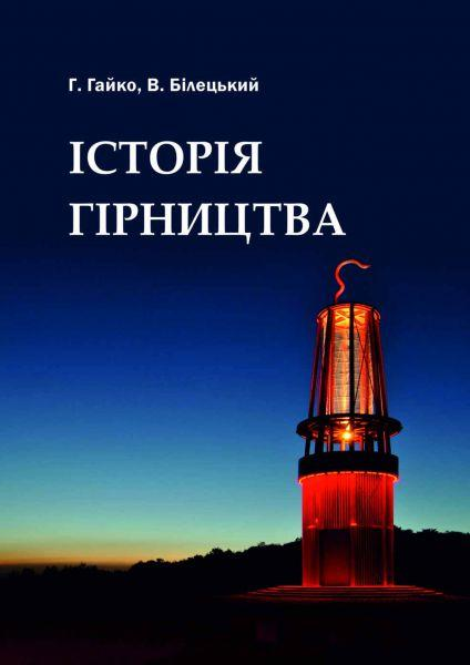 Фото